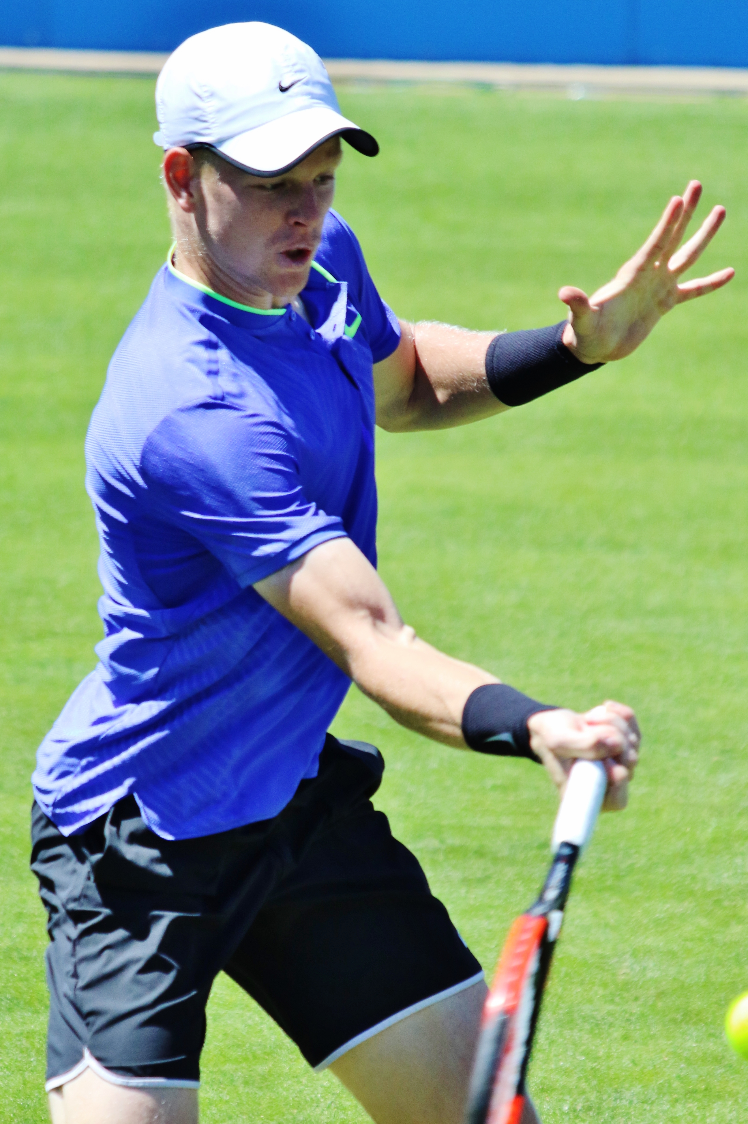 Edmund EBN17 (18)